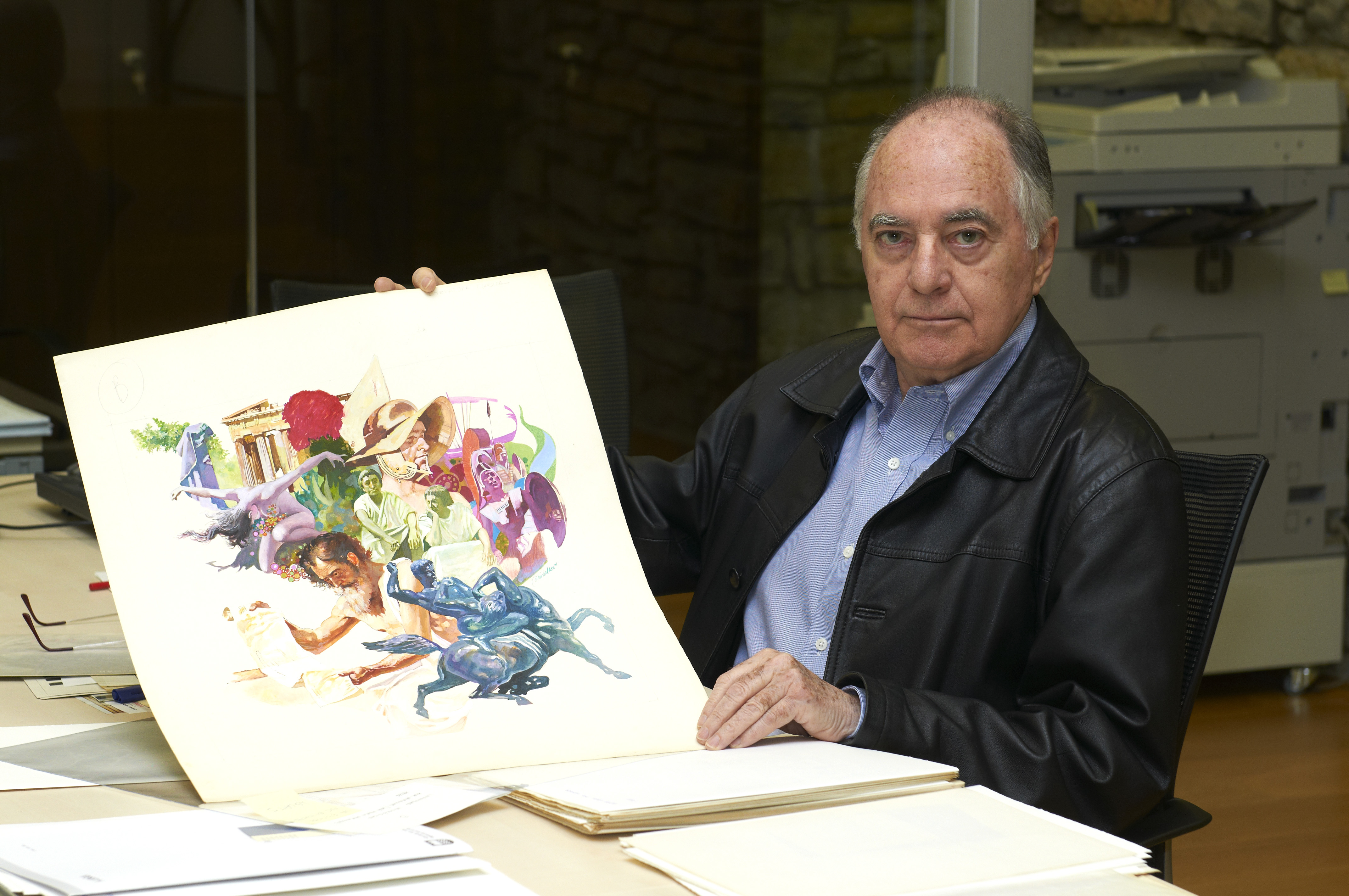 Fotografía de Luis Gasca, realizada por Ricardo Iriarte